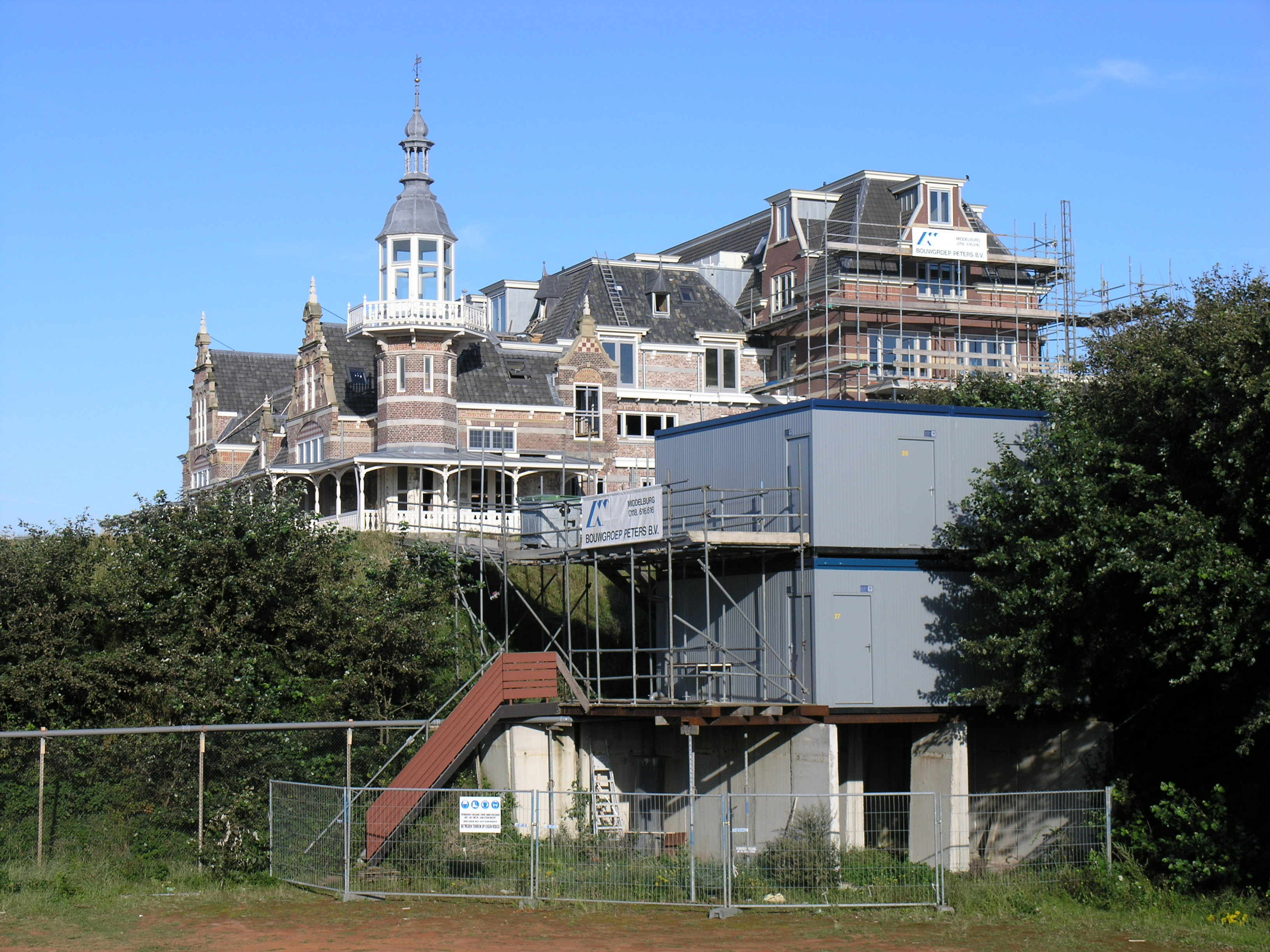 Domburg Badpaviljoen in restauratie en uitbreiding